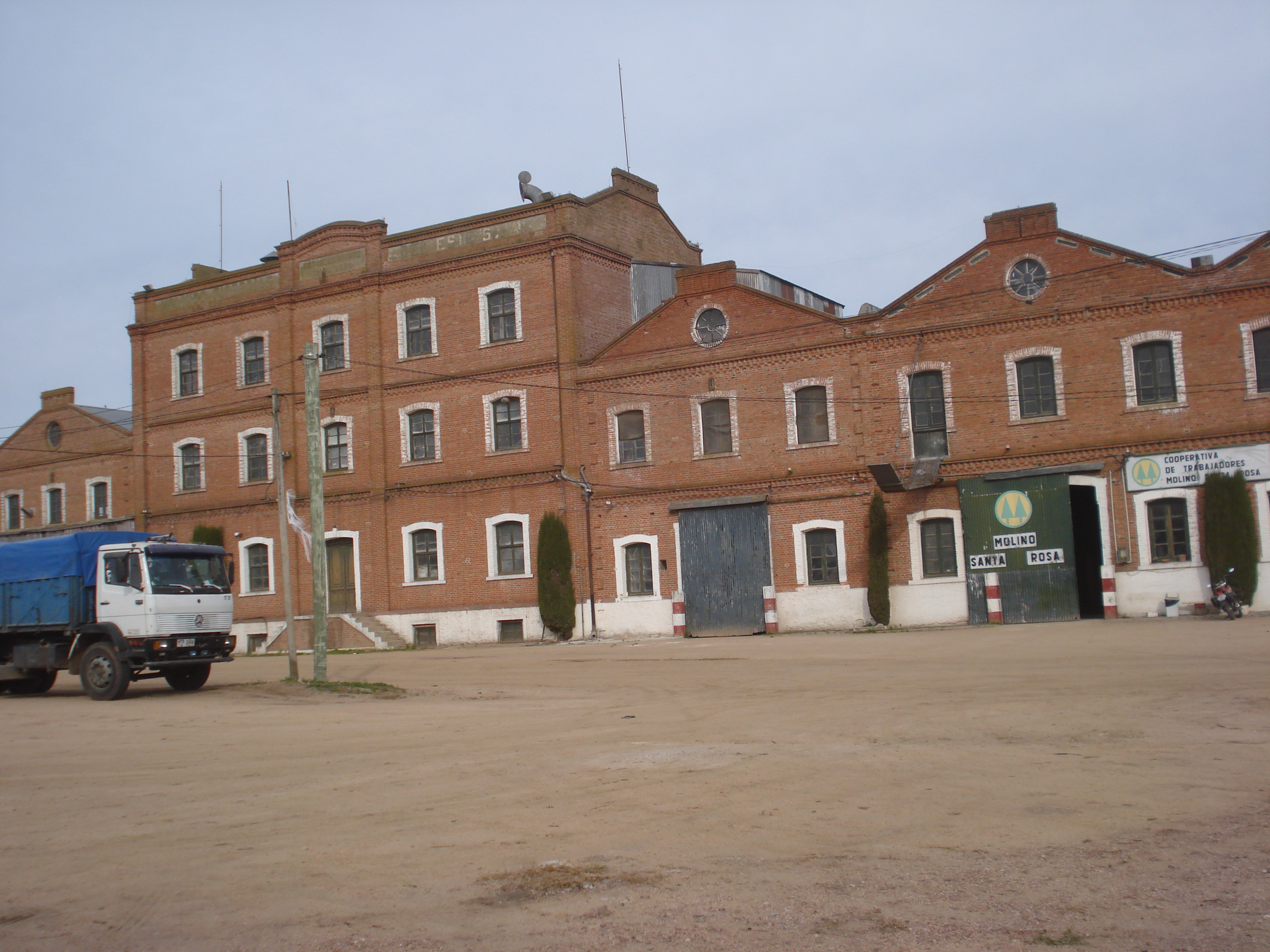 Fachada del Molino Santa Rosa, Canelones. Uruguay